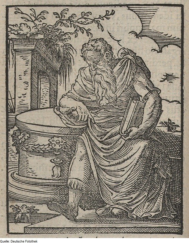 Original image description from the Deutsche Fotothek Ständebuch & Philosoph